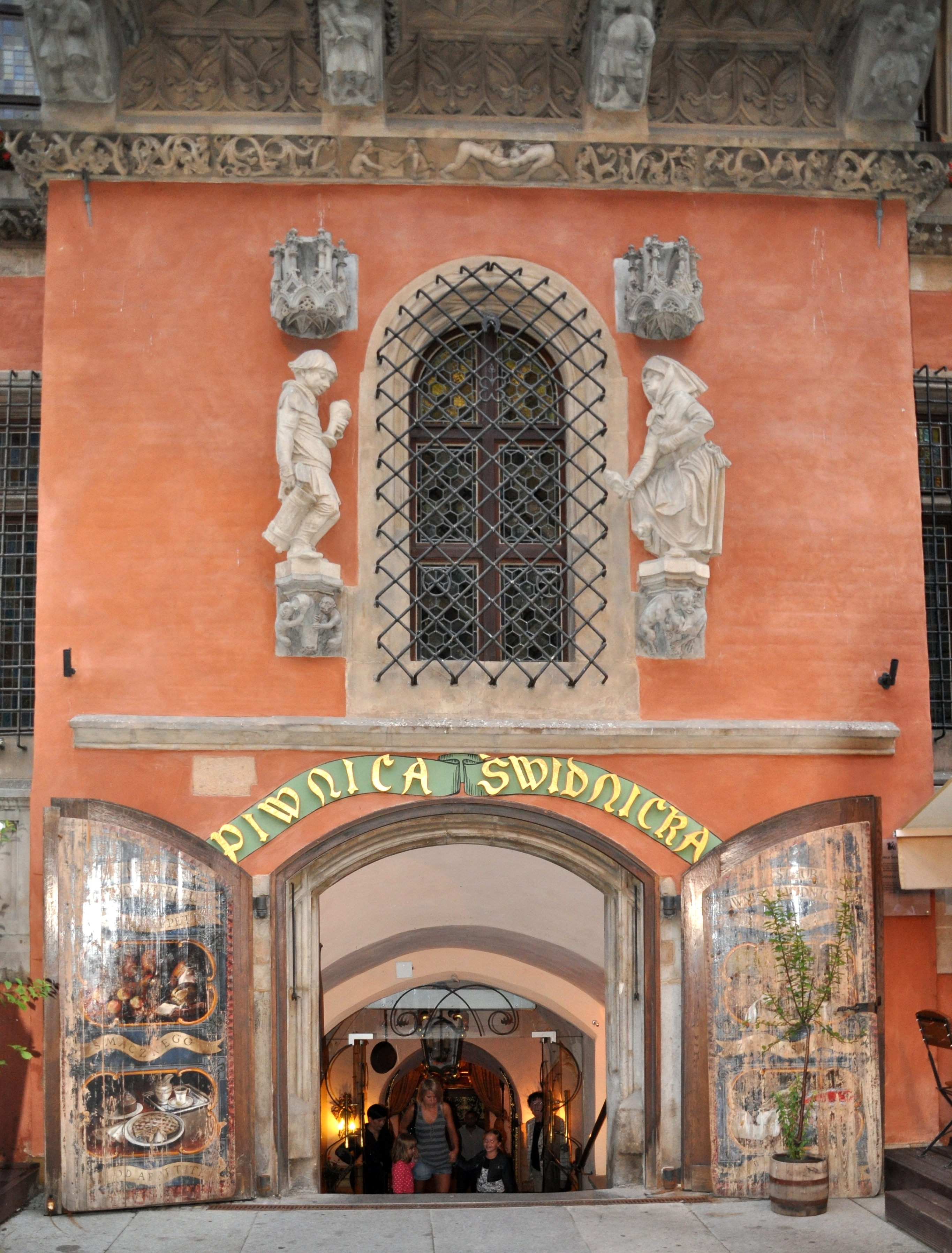 Der Eingang zum Restaurant "Schweidnitzer Keller" in Breslau (Polen)